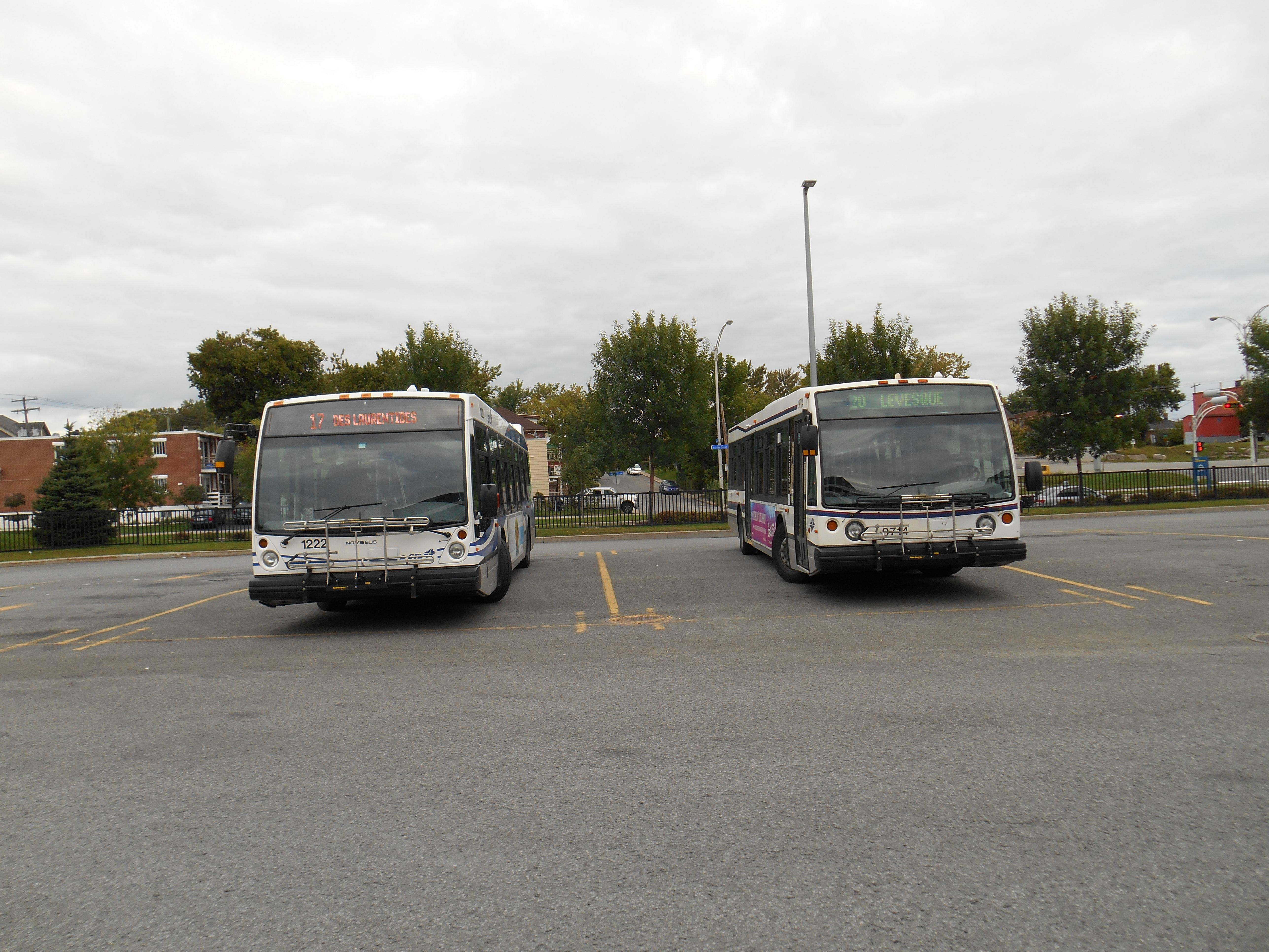 Autobus de Laval au terminus Cartier